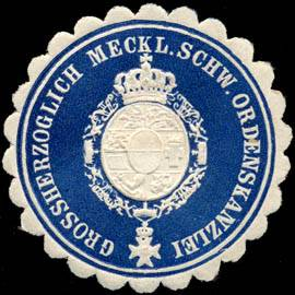 Sealing stamp Title: Grossherzoglich Mecklenburgisch Schweriner Ordenskanzlei Description: blau, weiß, geprägt Place: Schwerin size: 4 cm